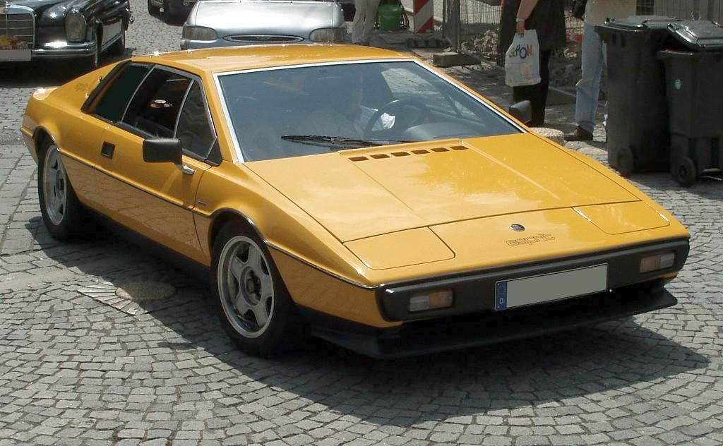 Lotus Esprit Series 2